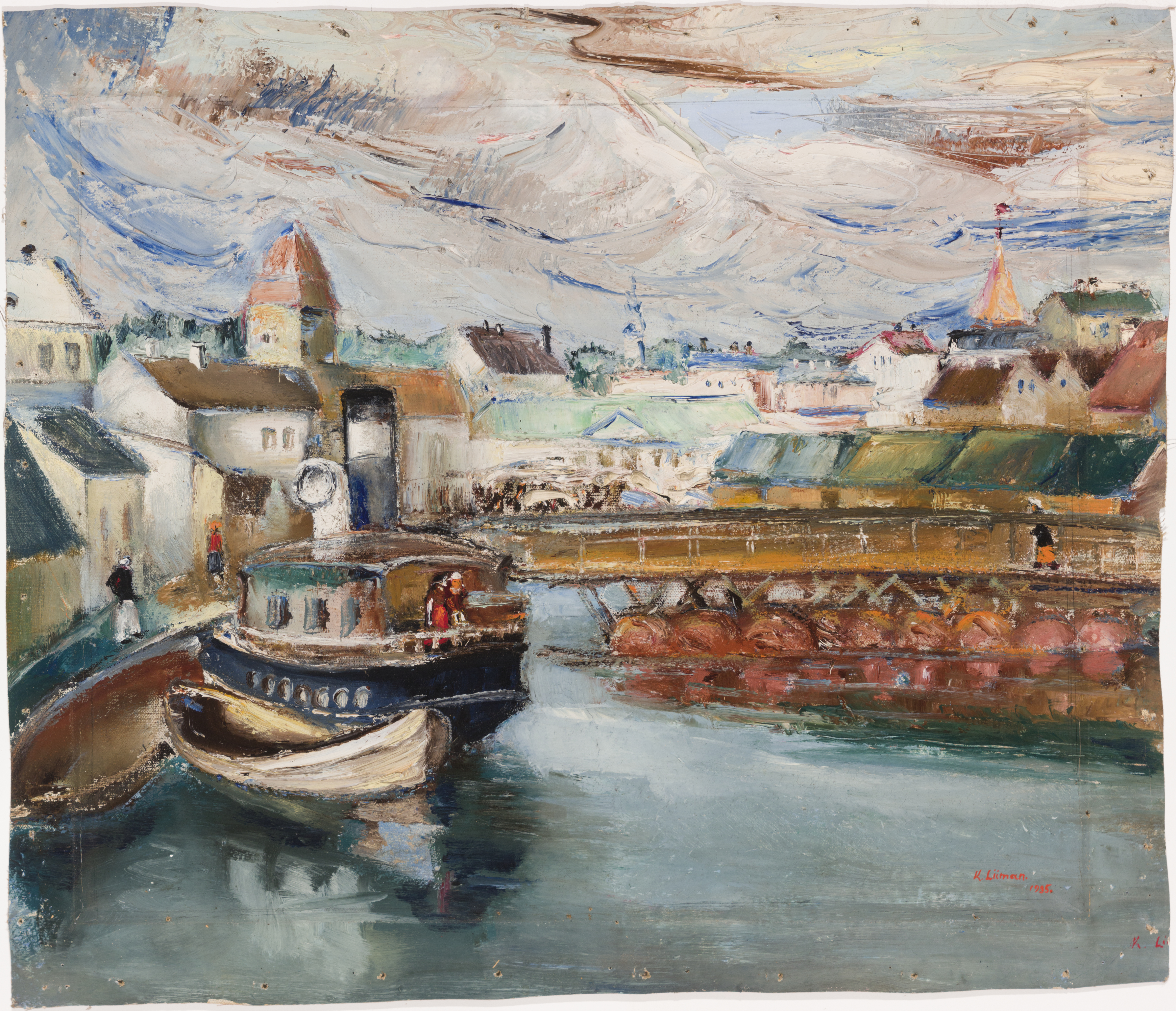 "Tartu motiiv". 1935. Õli lõuendil. 46,8 x 57,0 cm. MUIS: TKM TR 1425 M 316 This image on crowdsourcing geotagging platform Ajapaik